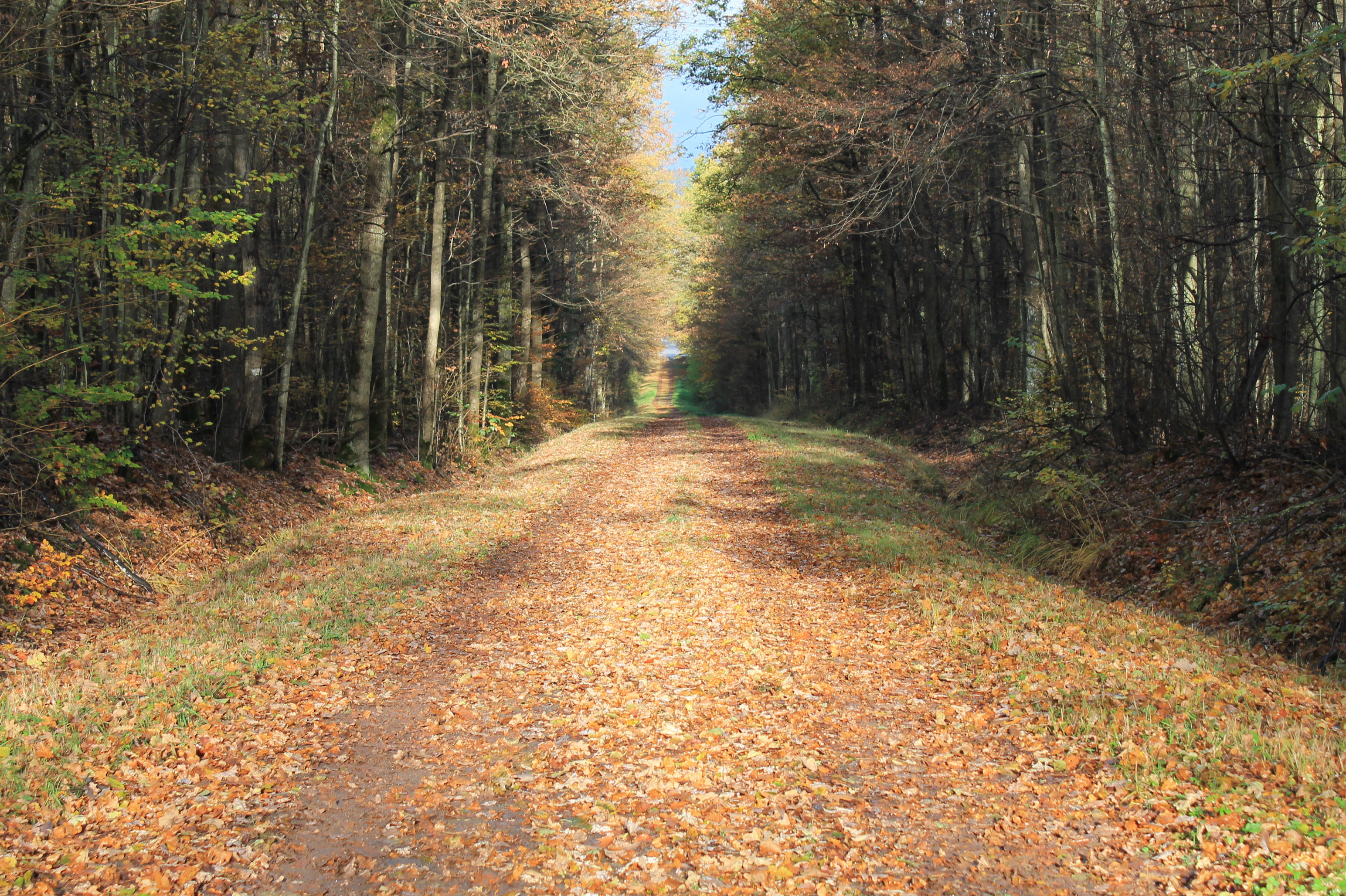 Une allée en ligne droite de la forêt de la Faisanderie (Saverne)